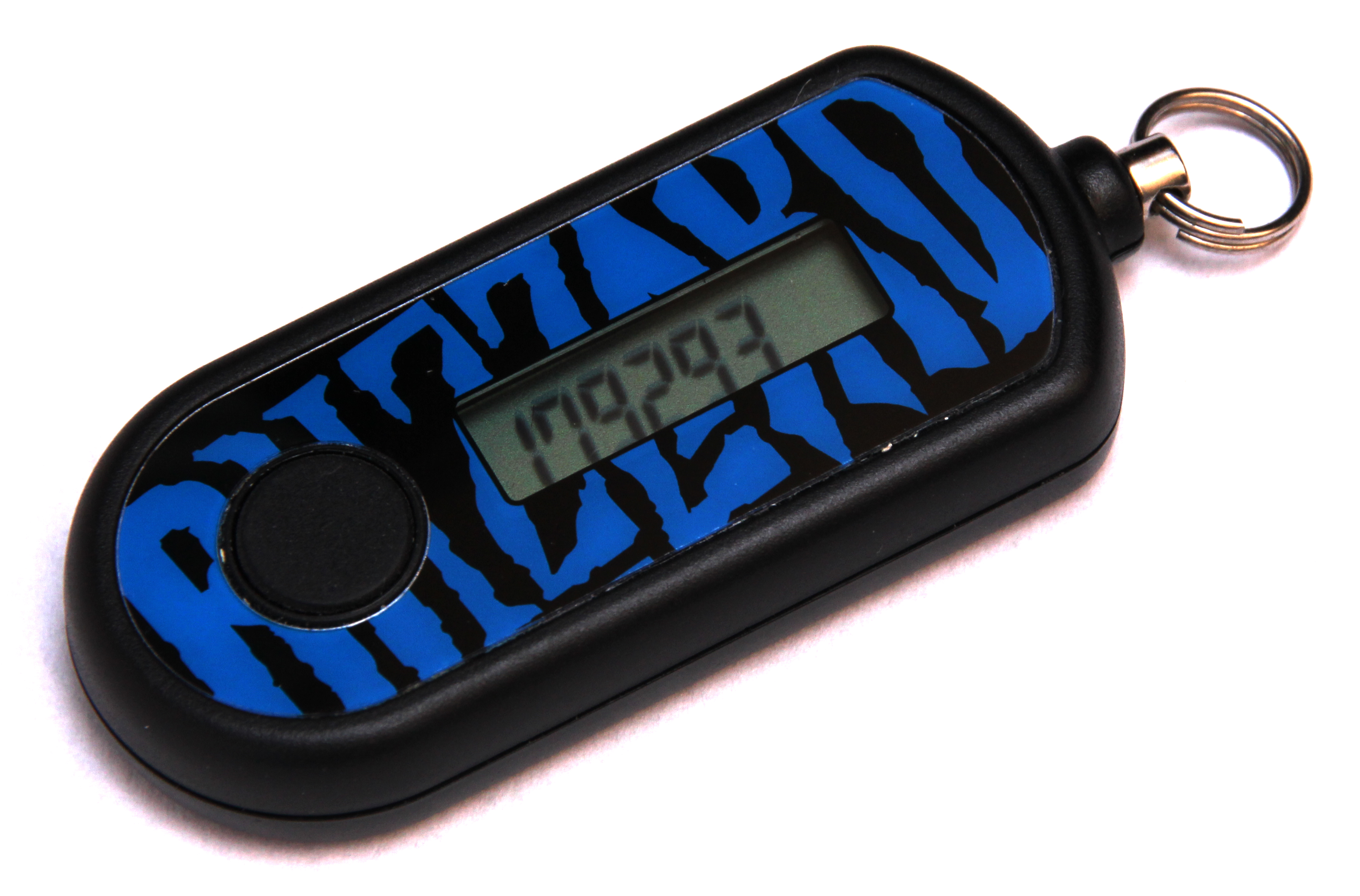 Der Mobile Authenticator von Blizzard für das .